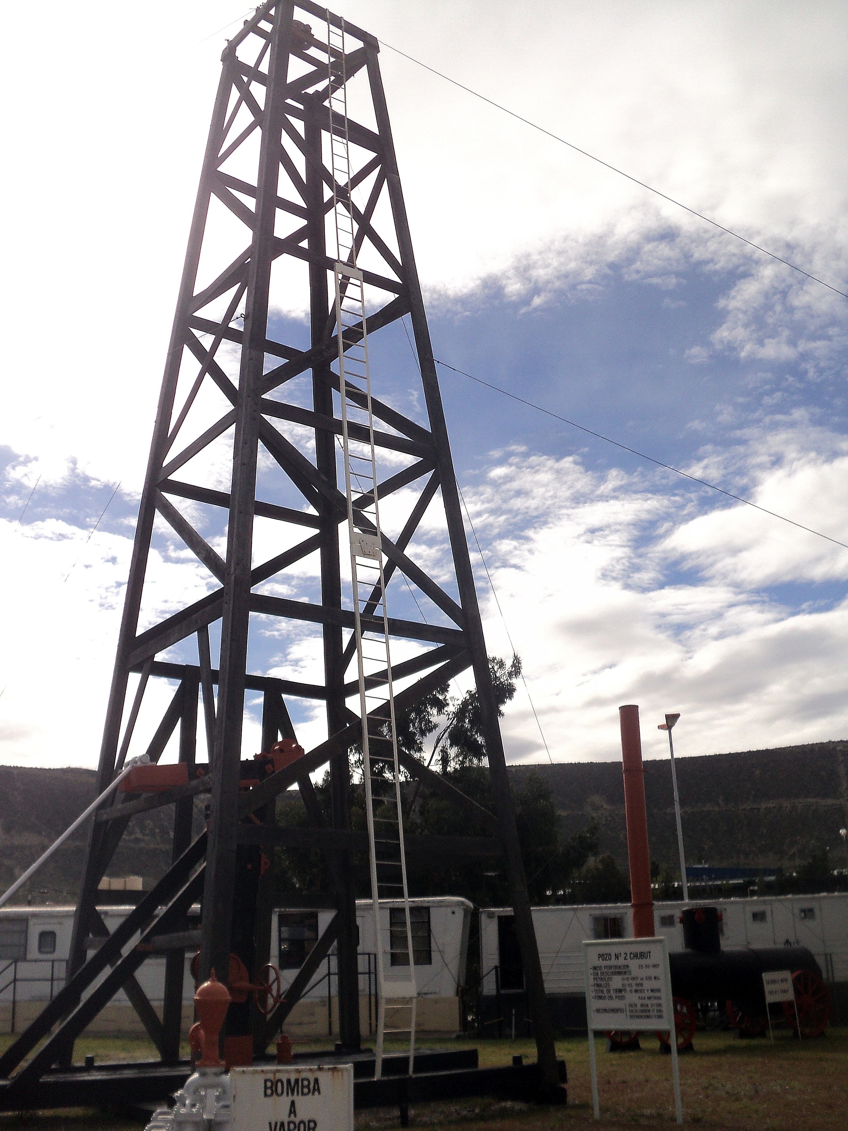 Torre que se usó en el primer pozo petrolero de Argentina que marcó la fundación de Km3